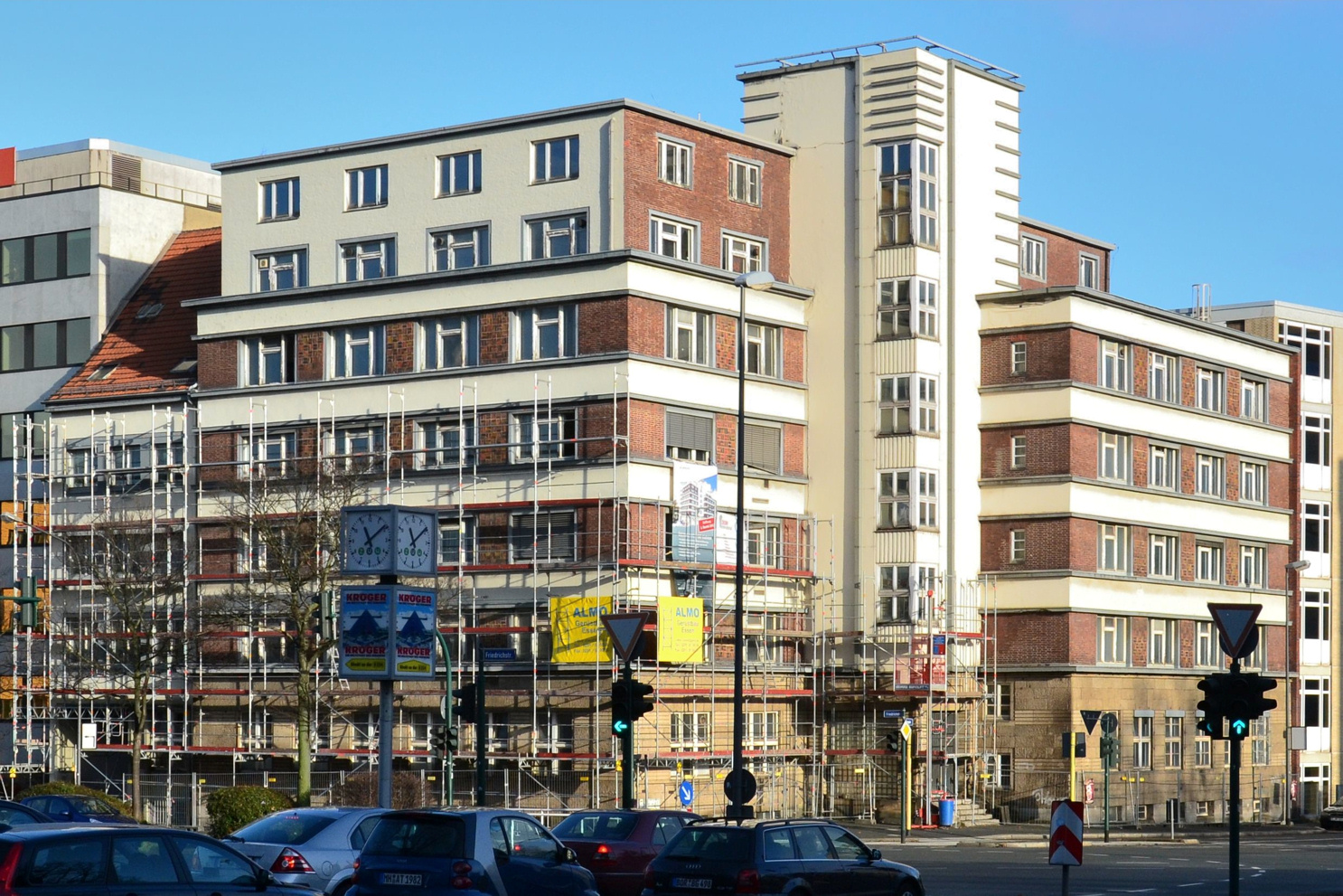 Osram-Haus Essen-Südviertel, Architekt: Ernst Knoblauch, erbaut 1929, unter Denkmalschutz